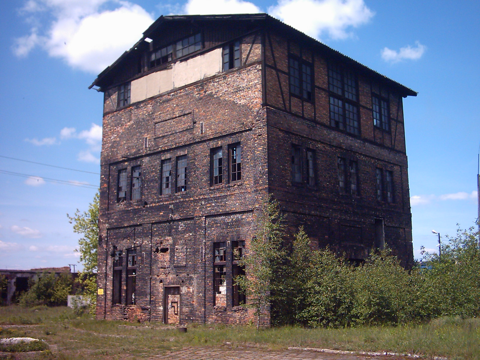 Jeden z budynków Fabryki Chemicznej z lat 20-tych w Hajnówce